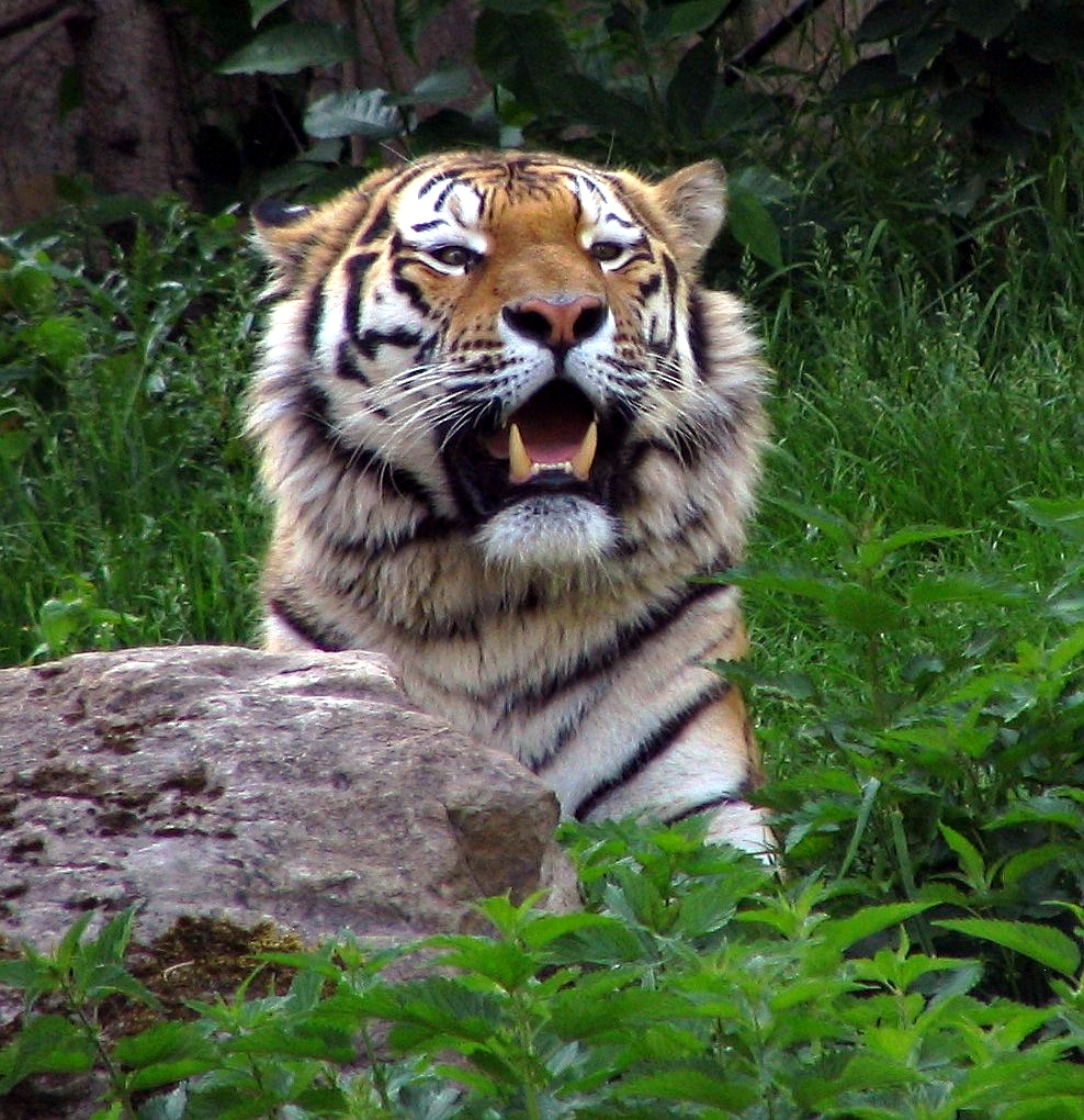 Panthera tigris altaica / Sibirian Tiger / sibirischer Tiger / Amurtiger